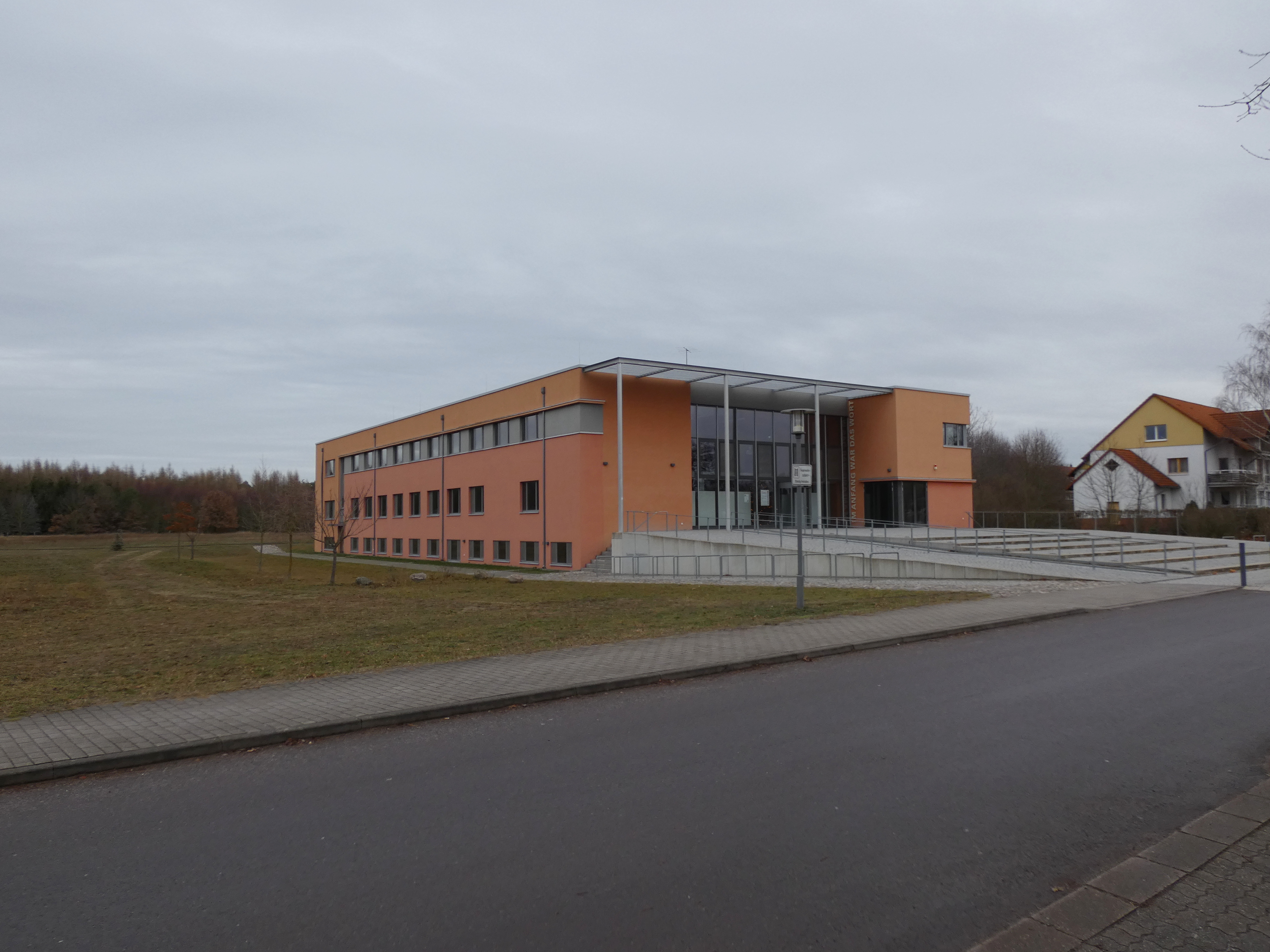 Bibliothek der Theologischen Hochschule Friedensau